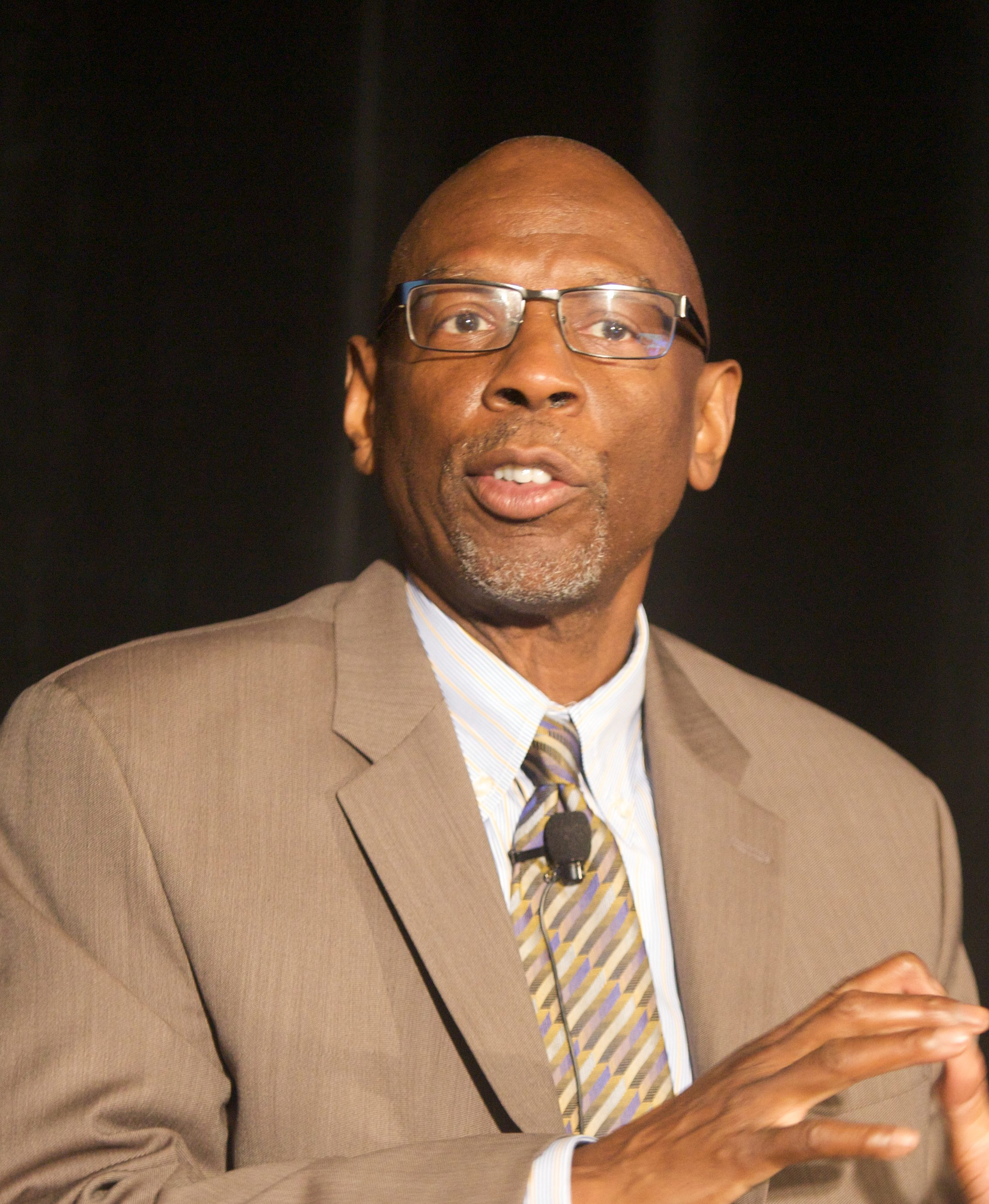 Geoffrey Canada